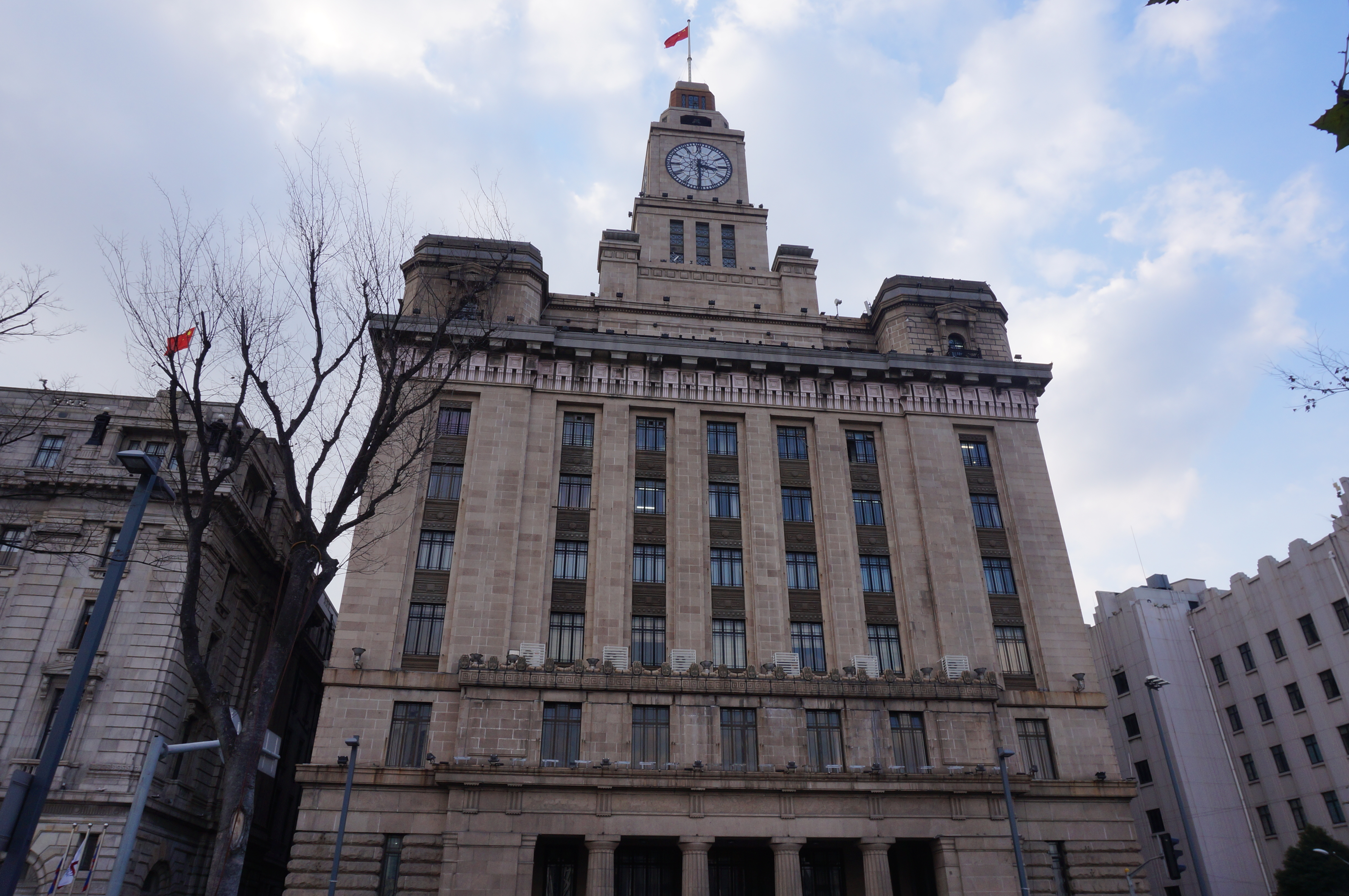 上海海关大楼